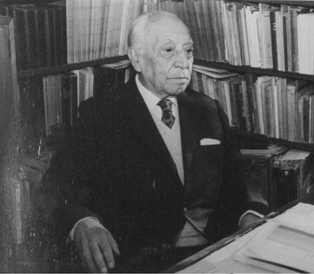 Foto de Yolando Pino en el escritorio de su casa, lugar donde trabajó por más de cincuenta años.